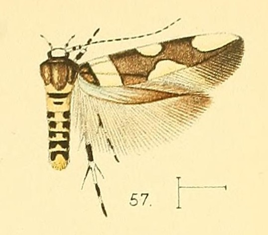 Macrobathra distincta